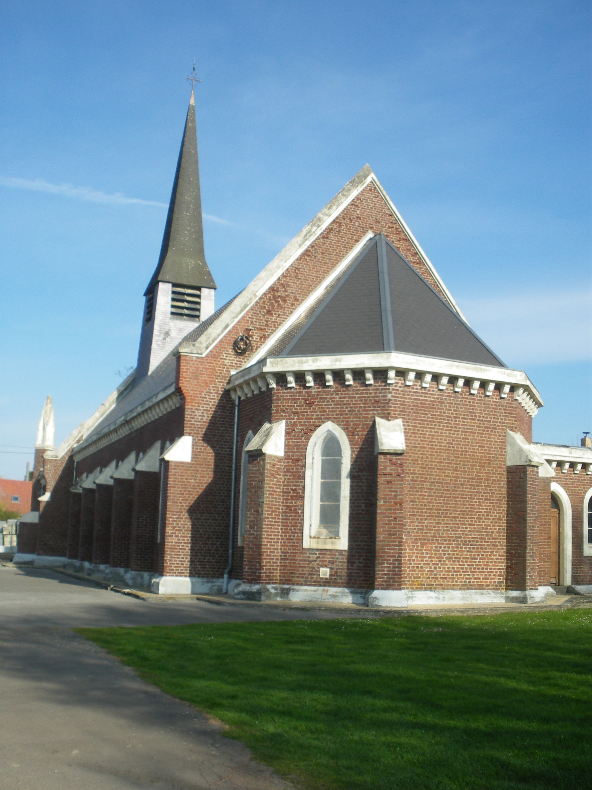 Vue de l'église de Bihucourt.